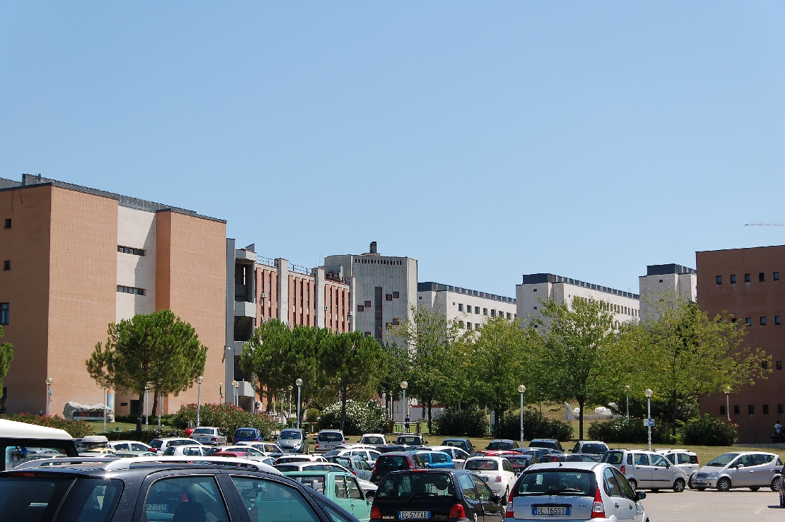 Chieti 2011